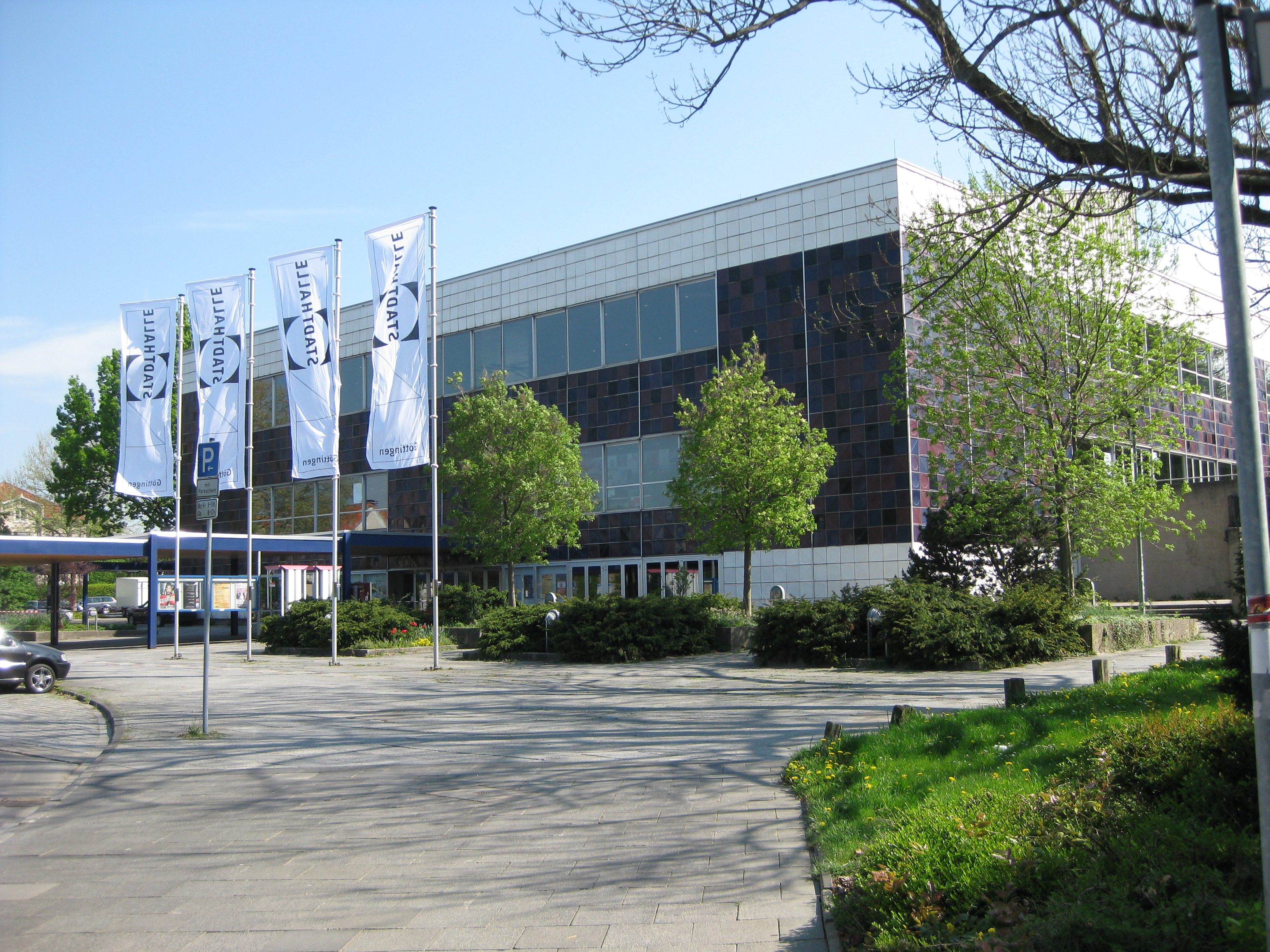 Stadthalle Göttingen April 2009